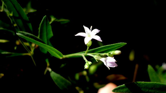 CC-BY © Alex Popovkin Source: Flickr: EOL Images